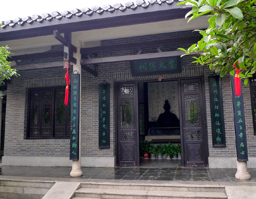 长沙贾谊故居